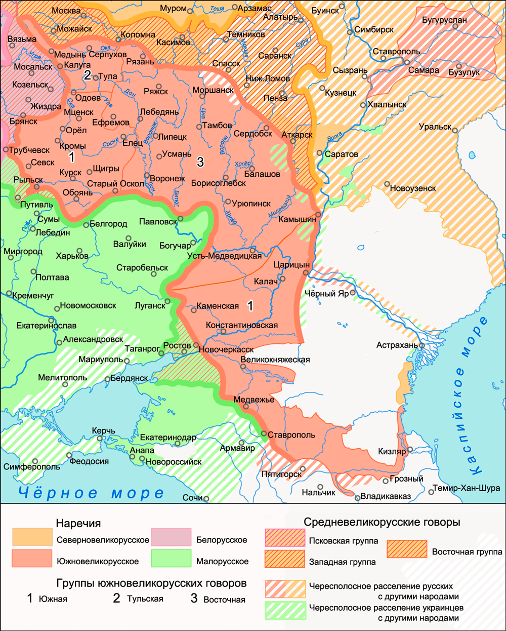 Фрагмент диалектологической карты русского языка 1914 года — территория южноевеликорусских говоров. Источник: Диалектологическая карта 1914 года (Дурново Н.Н., Соколов Н.Н., Ушаков Д. Н. Опыт диалектологической карты русского языка в Европе. — М., 1915)